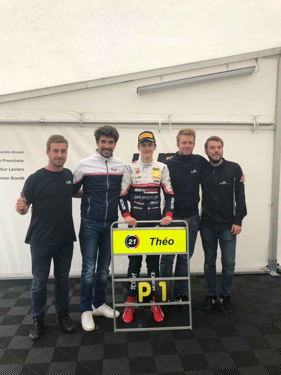 Théo Pourchaire célébrant son titre de champion d'Allemagne de Formule 4 en 2019 au Sachsenring. avec ses mécaniciens de son équipe US Racing.